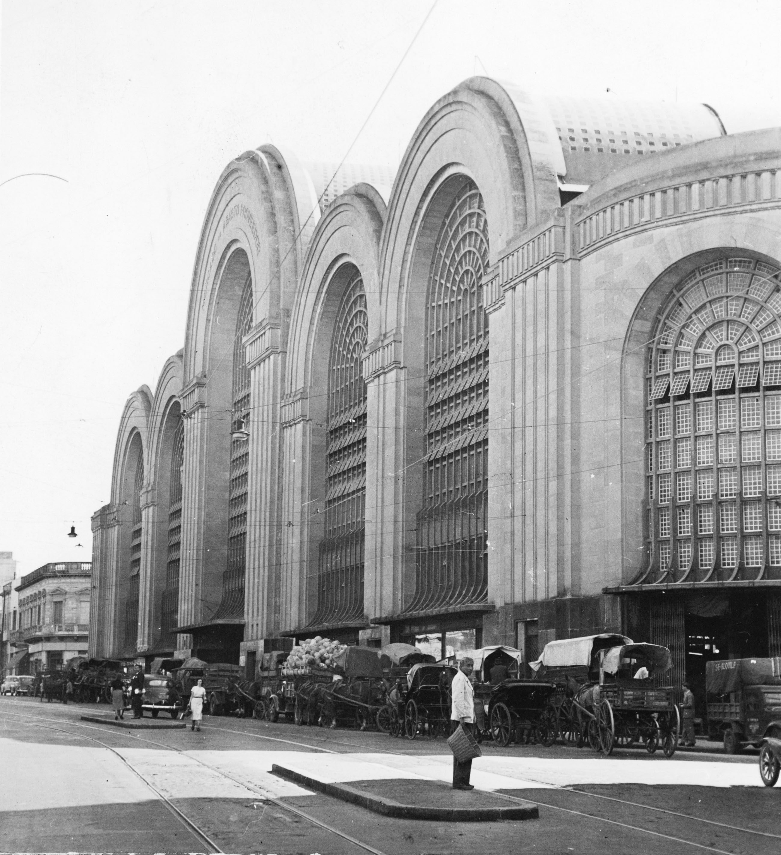 Mercado de Abasto de Buenos Aires, ca. 1945. Documento fotográfico. Inventario 332504.